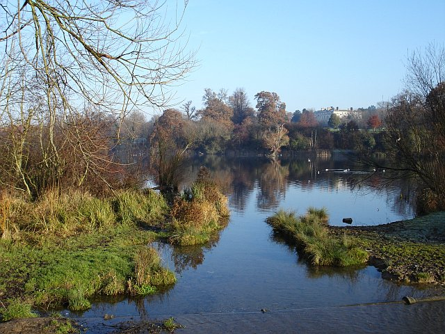 Mote Park Lake